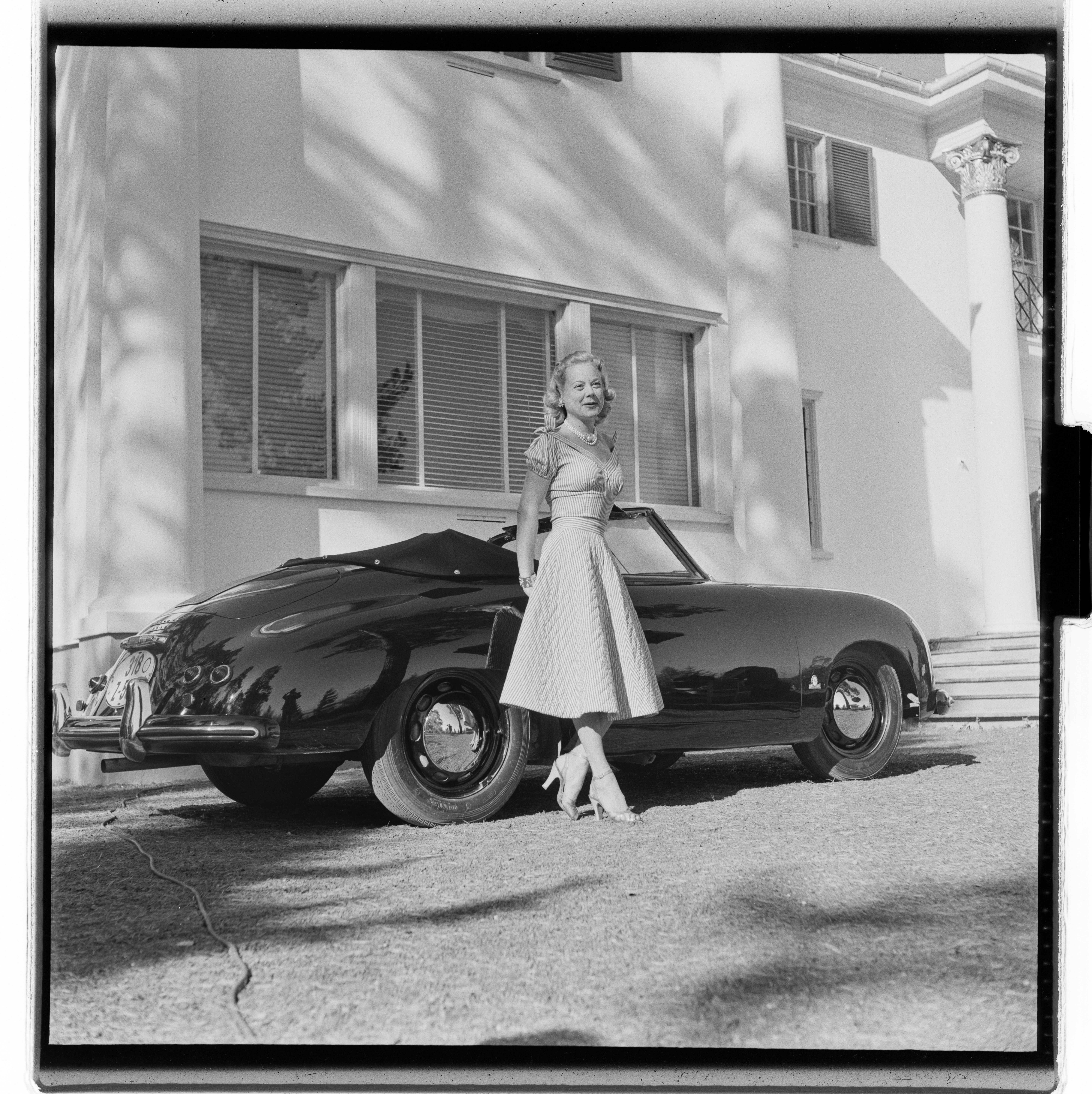 Bildet er hentet fra Arkivverket. Sonja Henie. NÅ nr. 21, 1953 Arkivinstitusjon : Riksarkivet Arkivnavn : Billedbladet NÅ Sted : Norge, Ukjent, Ukjent, Emneord: Kunstløpere Avbildet